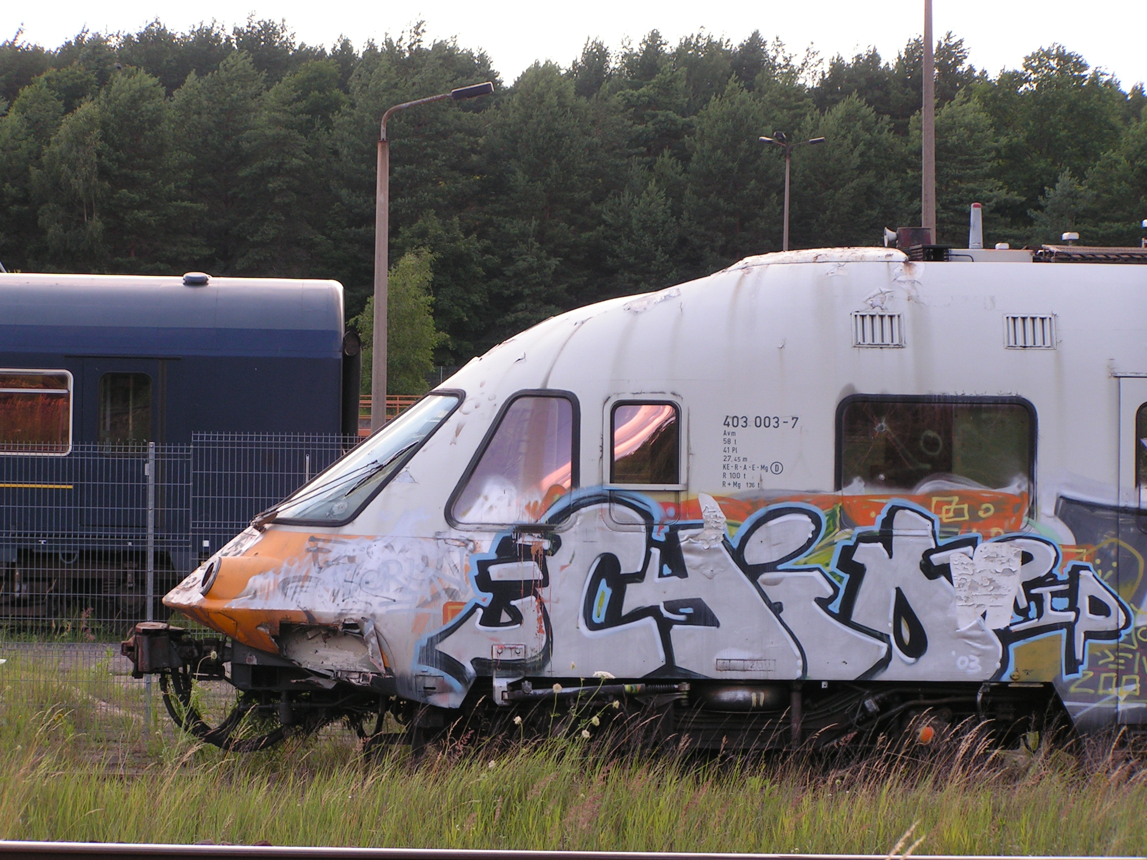 DB-Baureihe 403, Triebwagen 403-003-7, abgestellt am Bahnbetriebswerk Neustrelitz an der Strecke Richtung Neubrandenburg/Stralsund